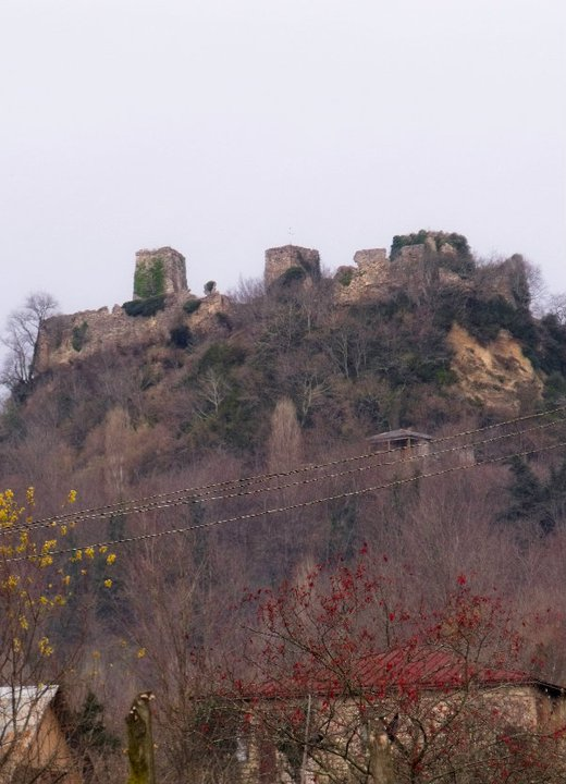 ჭაქვინჯის ციხე